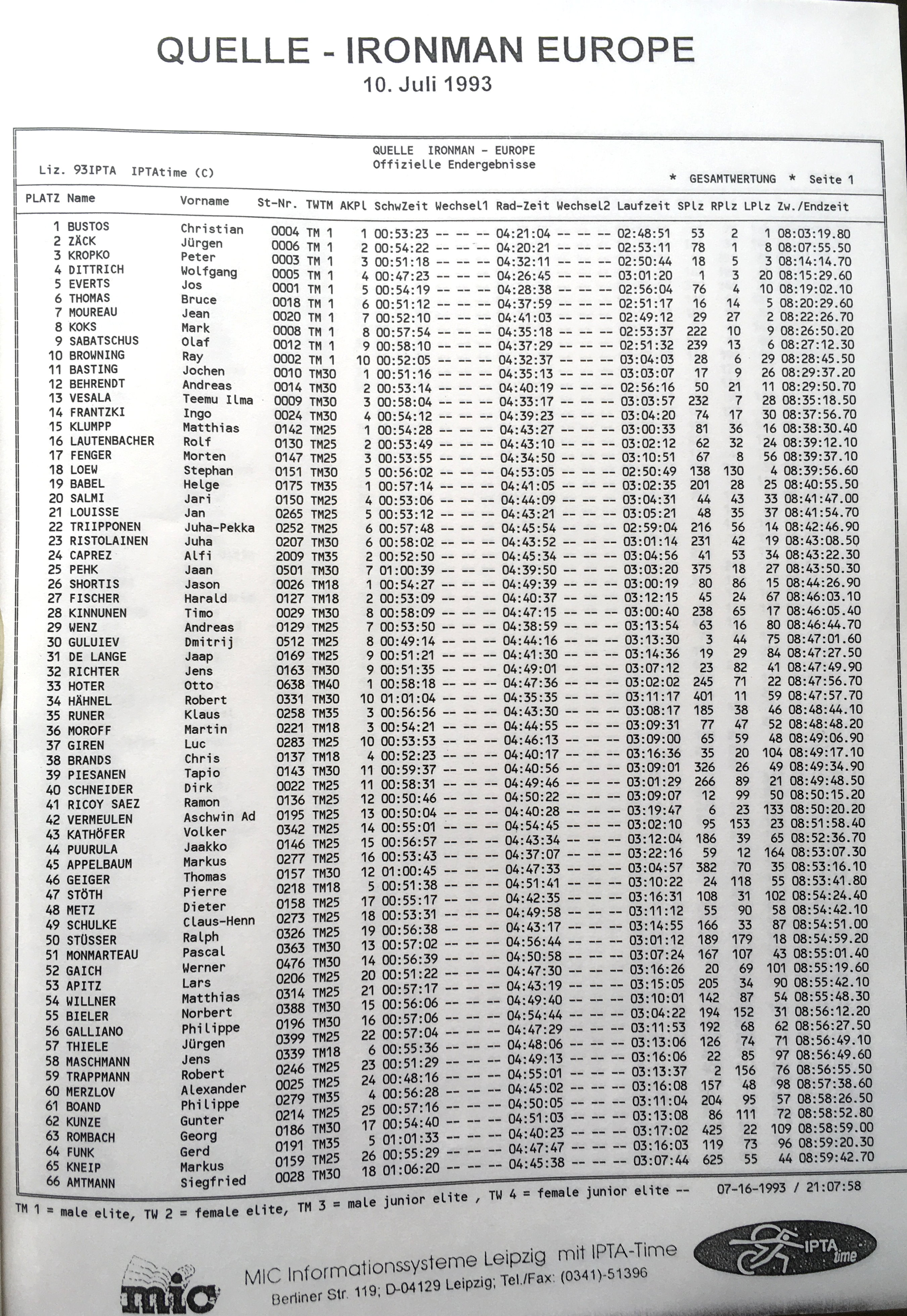 Erste Seite der Ergebnisliste: IRONMAN EUROPE Roth 1993. Die Zeitmessung beim IRONMAN EUROPE Roth fand bis 1996 mit dem IPTAtime System statt.